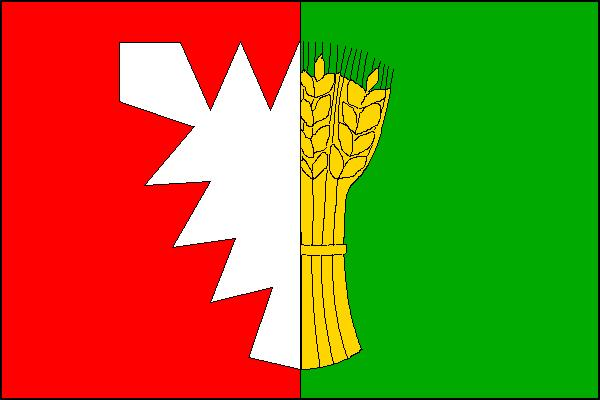 Vlajka obce Němčice (okres Kroměříž)